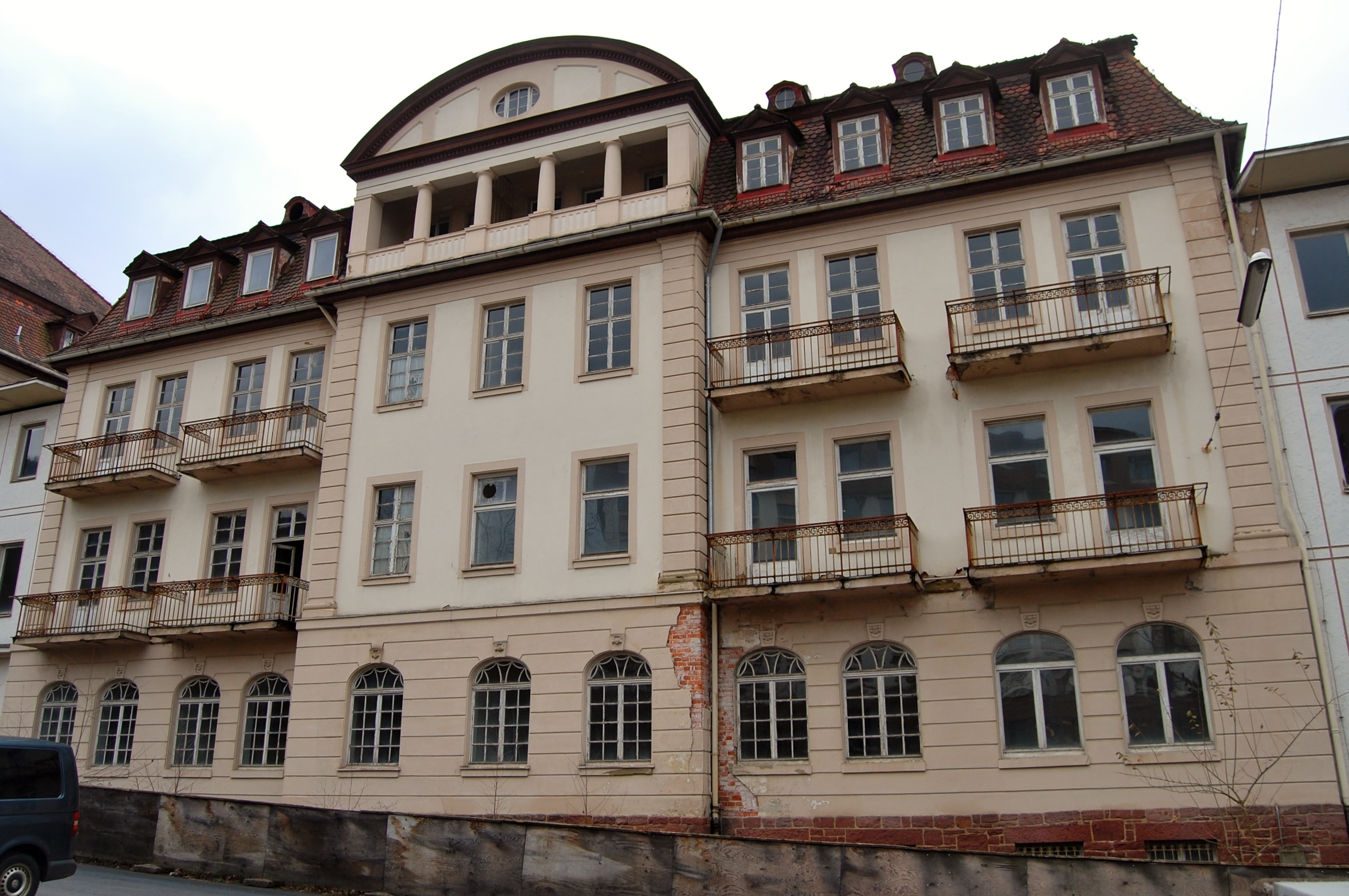 Stammhaus aus 1906 des ehemaligen Sanatoriums Apolant in Bad Kissingen, Menzelstraße 8-10